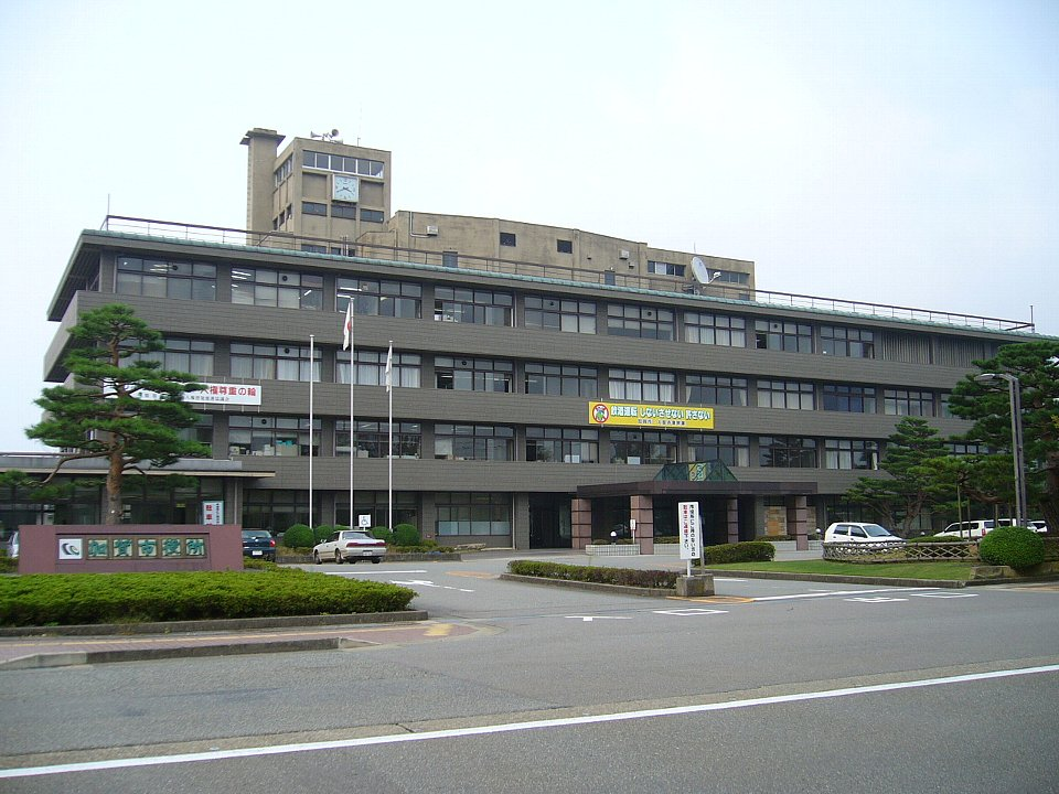 加賀市役所 2006年10月12日 Bakkai撮影